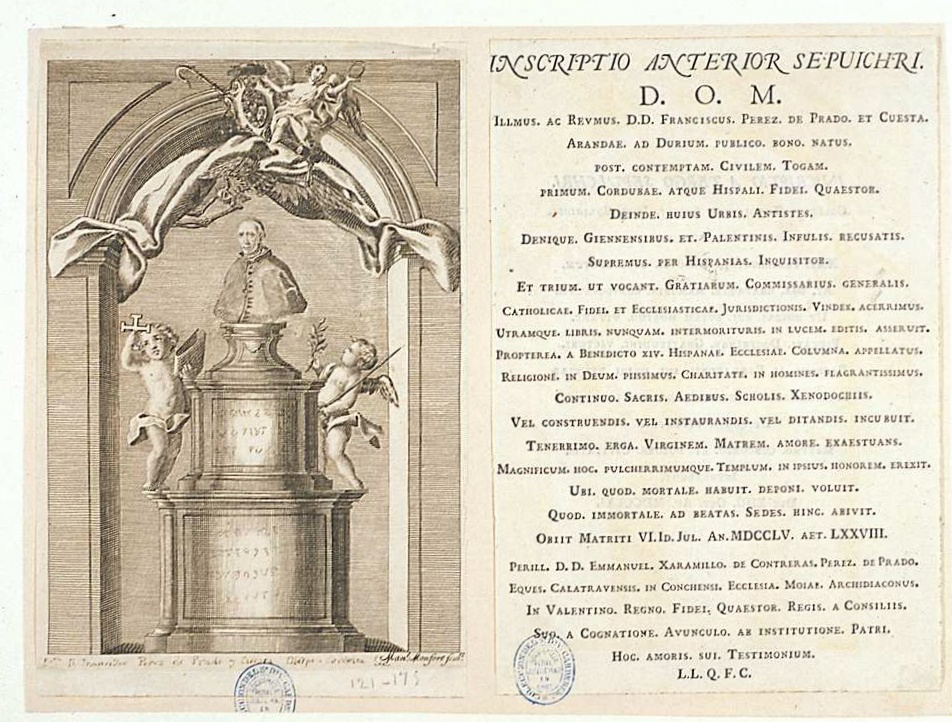 Francisco Pérez de Prado, estampa recortada de un libro y hoja con la inscripción que figura en el mausoleo. Madrid, Biblioteca Nacional de España